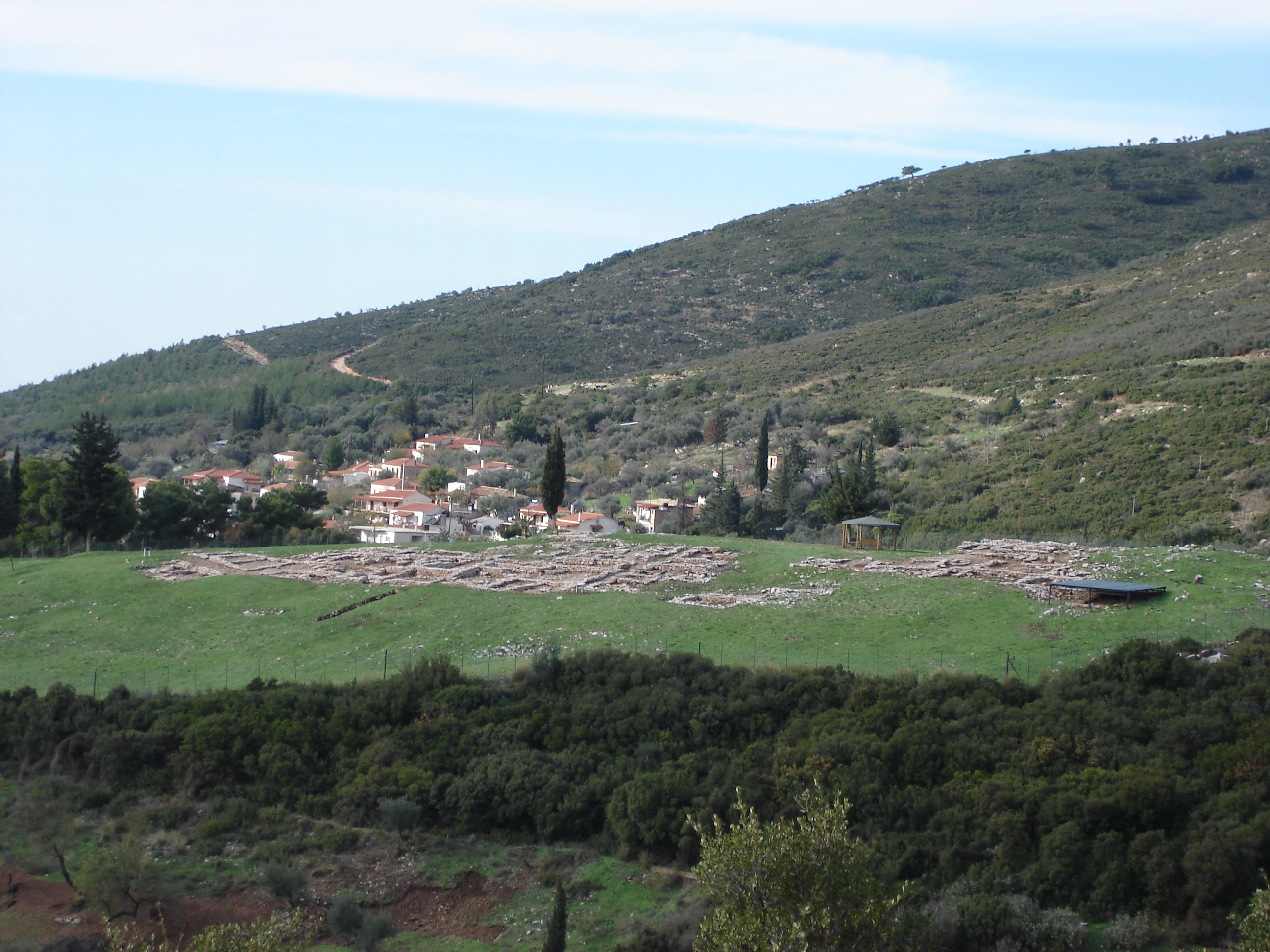 Acient city of Xalandritsa Achaia, GreeceΜυκηναϊκός οικισμός Χαλανδρίτσας, Αχαία